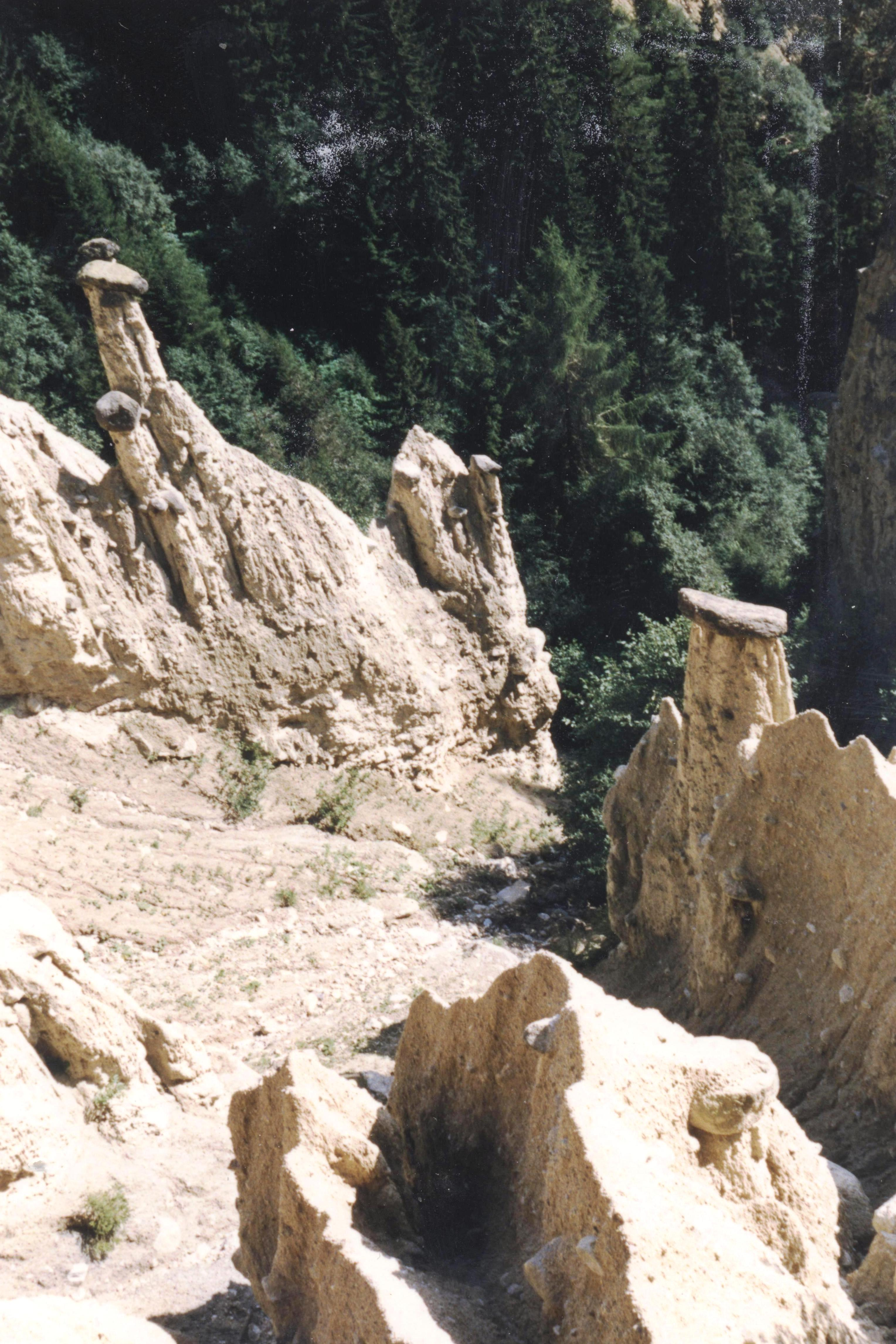 Buedempyramiden am Pustertal. Kategorie:Landformen